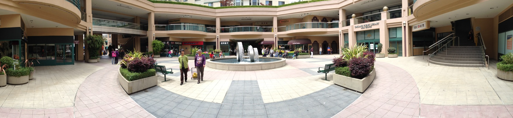 粵語: 屋崙華埠富興中心